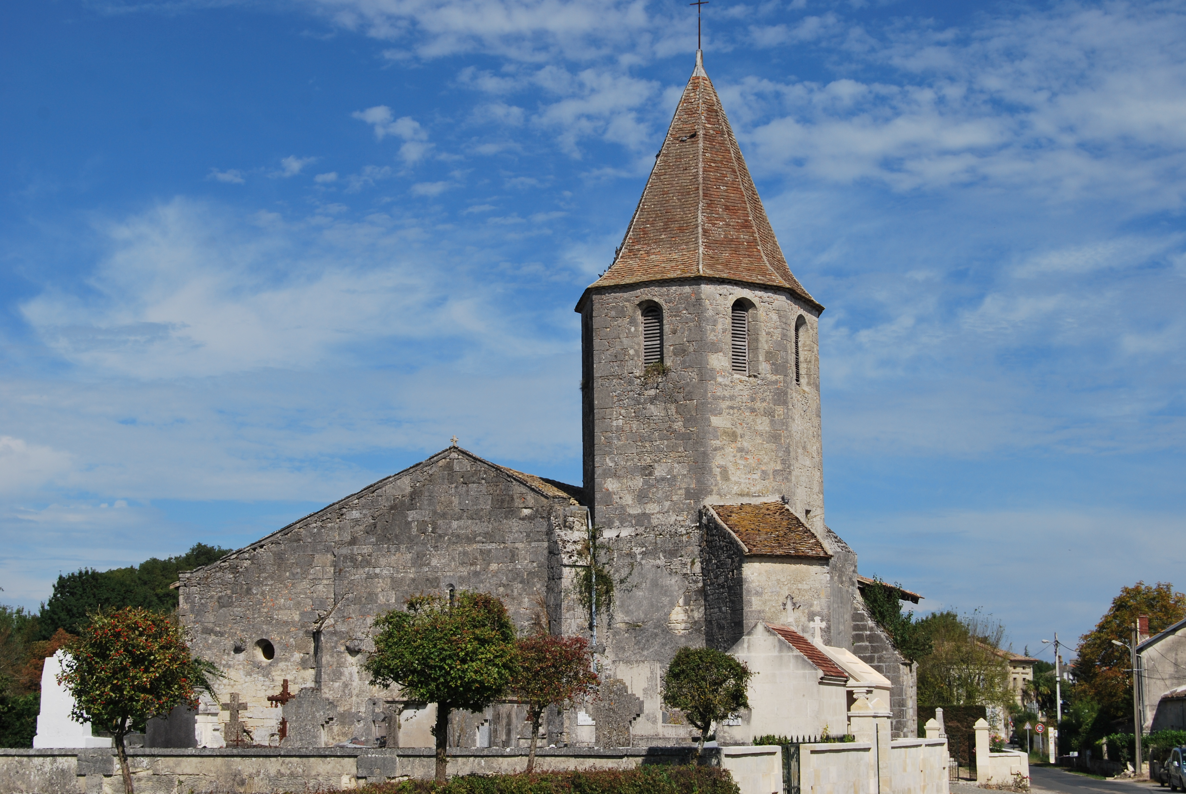 Église Saint-Hilaire de Puynormand